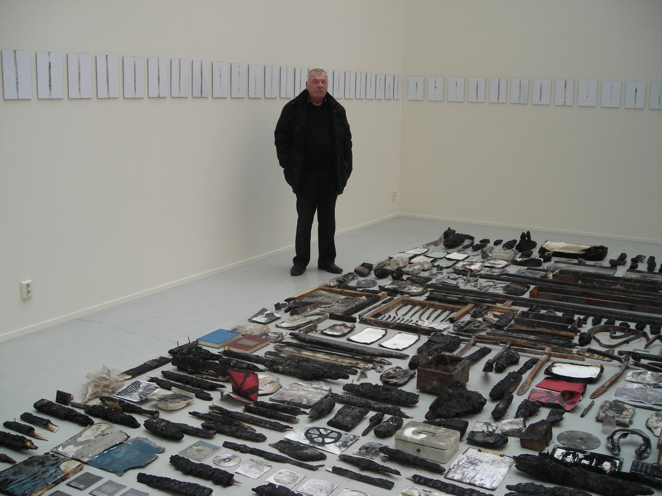 Ausstellung in Amersfoort Arbeit: "Scharzes Wasser"